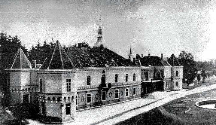 Foto von einer alten Postkarte um 1900, die Schloss Maires, erbaut 1713 von Matthias Heinrich Butz von Rolsberg, zeigt